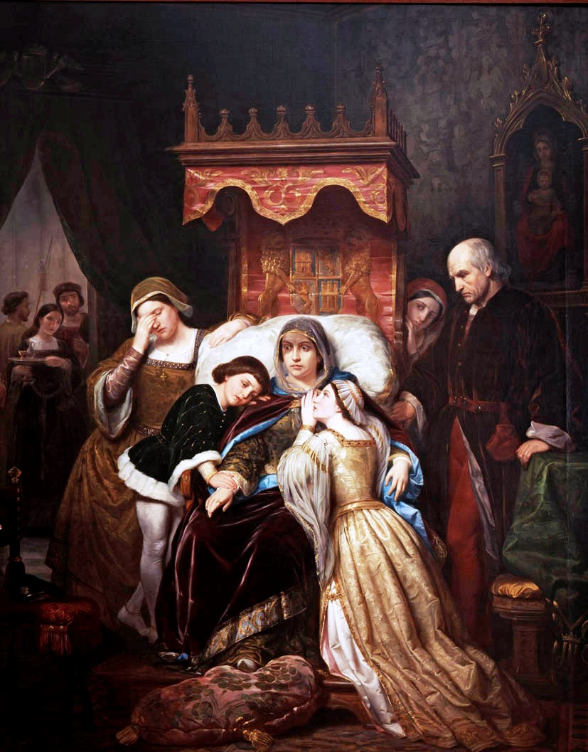 Cuadro atribuido al pintor barcelonés Pelegrí Clavé, en el que se muestra a la reina viuda de Castilla, Isabel de Portugal y Braganza, siendo víctima de uno de sus ataques de demencia. A su lado se encuentran su hijo menor, Alfonso de Castilla (izquierda) y su hija mayor, la futura reina Isabel la Católica (derecha) junto con otros personajes de la pequeña corte que acompañaba a la familia en su exilio.